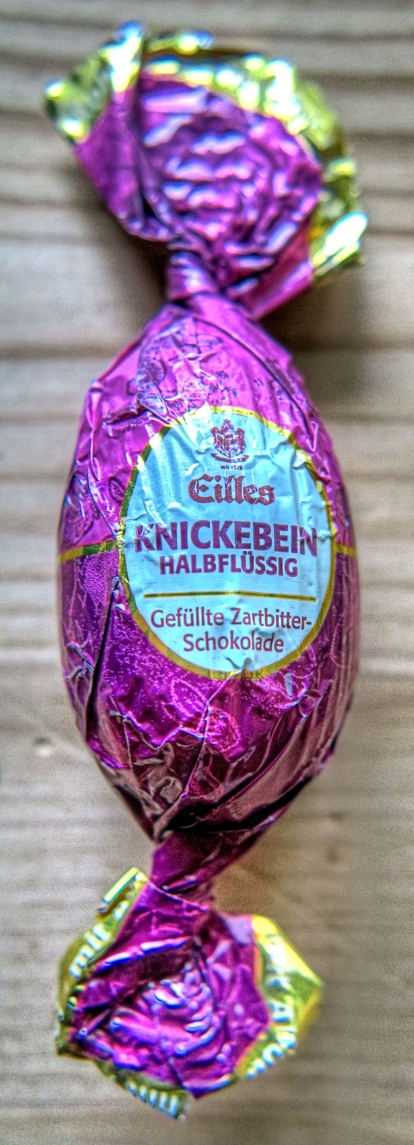 Schokoladen Osterei mit halbflüssiger Knickebeinfüllung von der Firma Eilles aus München